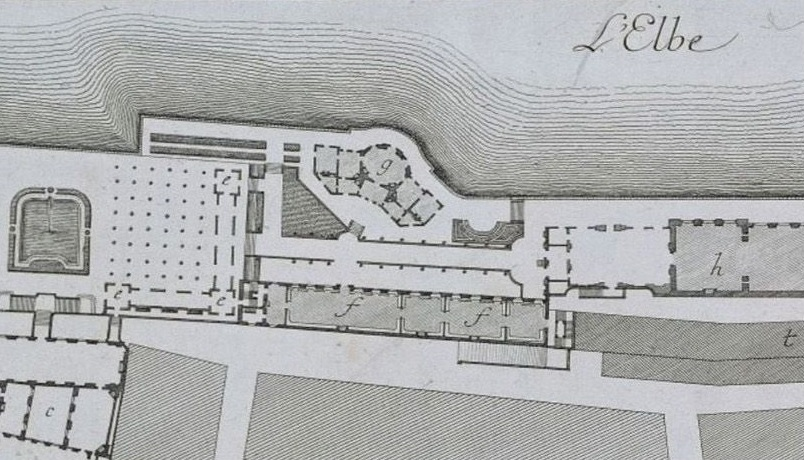 Plan der Brühlschen Terrasse in Dresden 1761 c) Palais, f) Bibliothek, g) Gartensaal, h) Galerie, t) Klepperstall